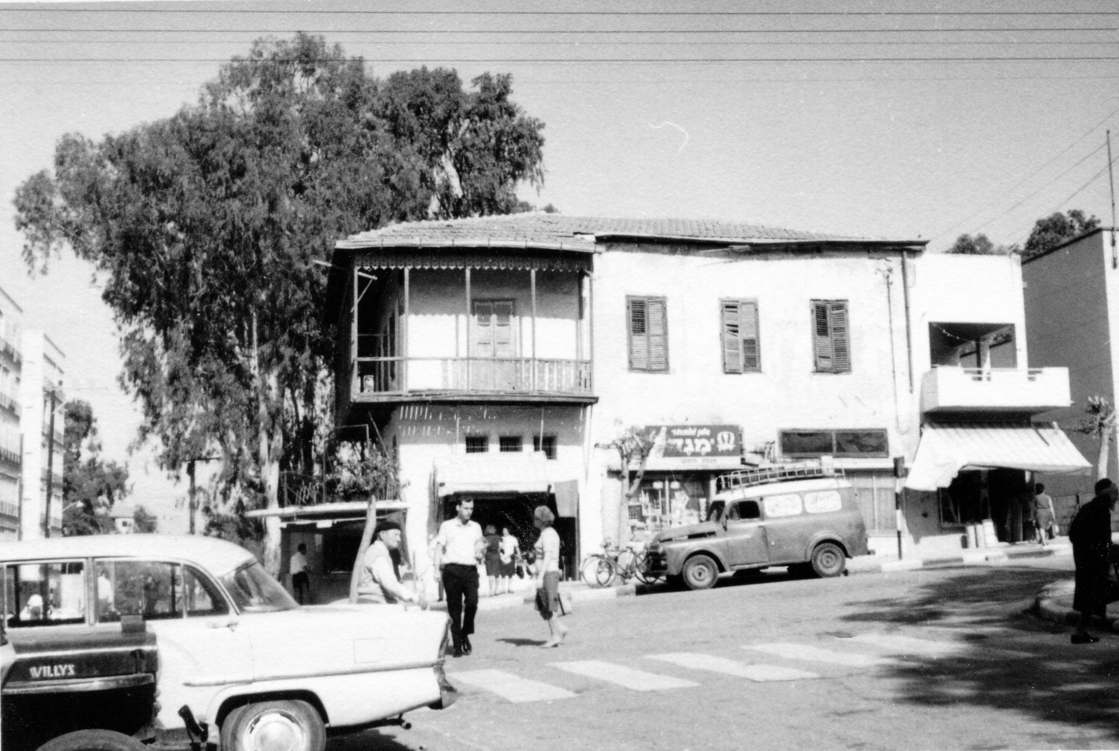 ביתו של הפקיד הראשי של הברון רוטשילד This is a photo of a heritage building in Israel. Its ID is 9-8300-023